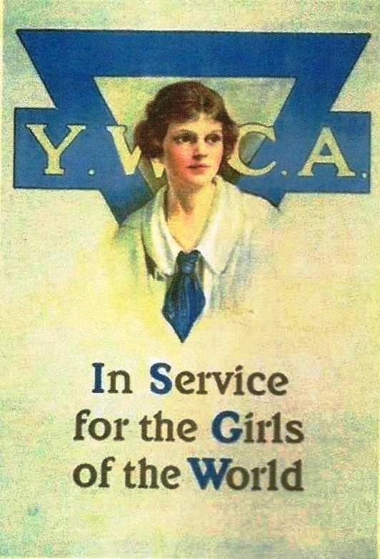 Affiche ancienne de l'YWCA (vers 1918)